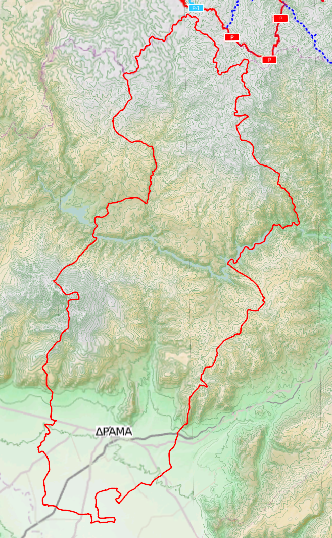 Τοπογραφικός χάρτης του Δήμου Δράμας (2011)